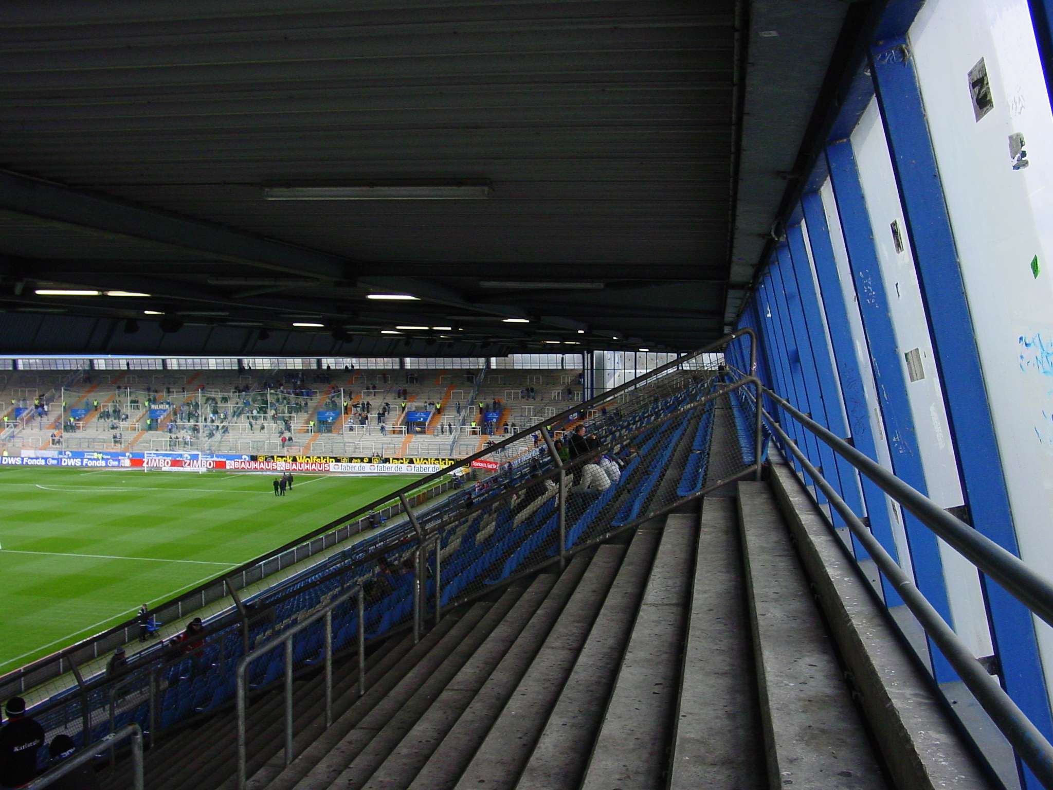 Rewirpower-Stadion, Innenansicht vor dem Spiel gegen Karlsruher SC (2007)